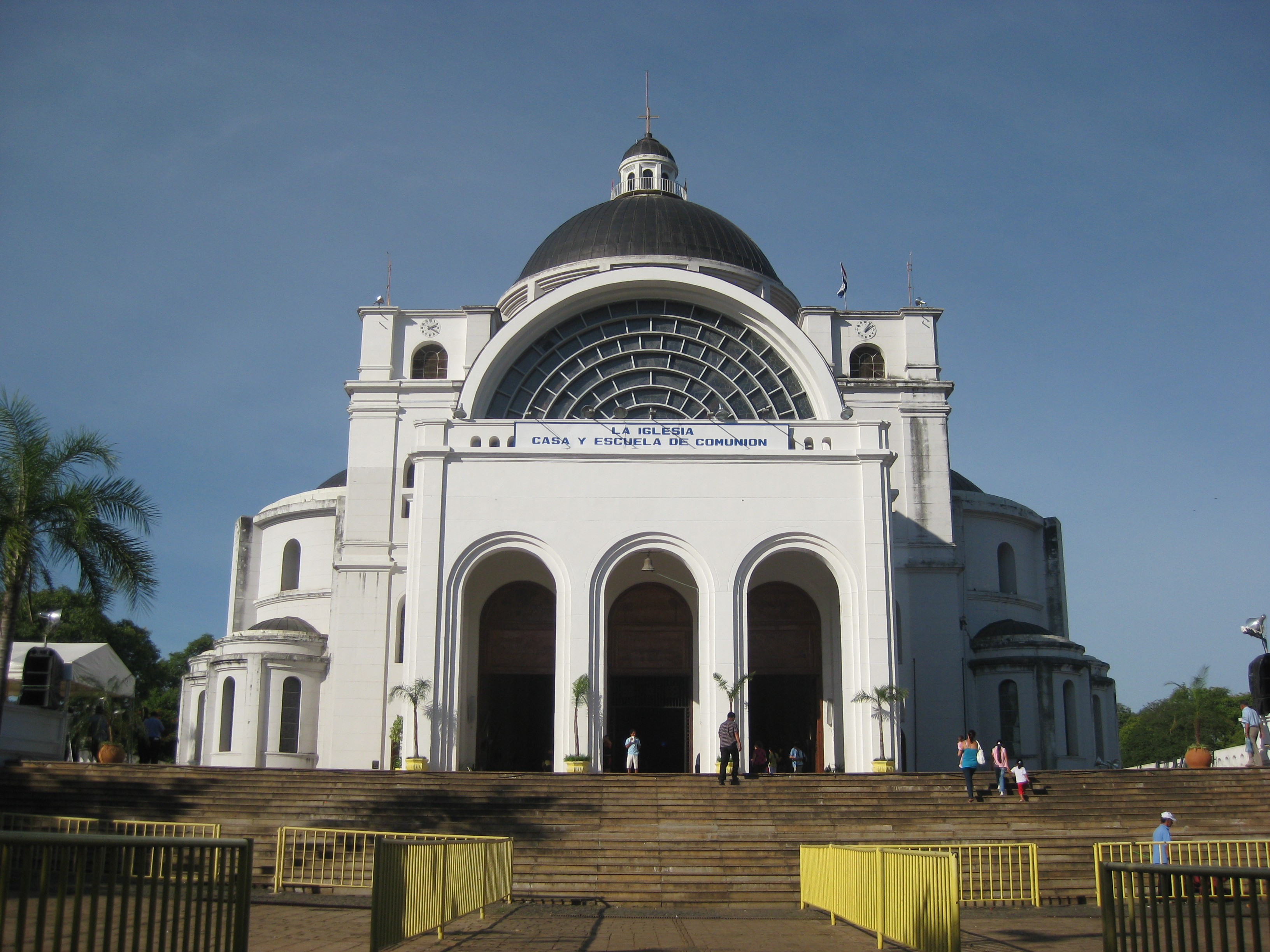 CAACUPE, Basílica de la Virgen de los Milagros